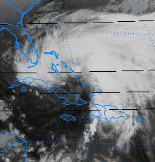 Huracán Gordon 1994